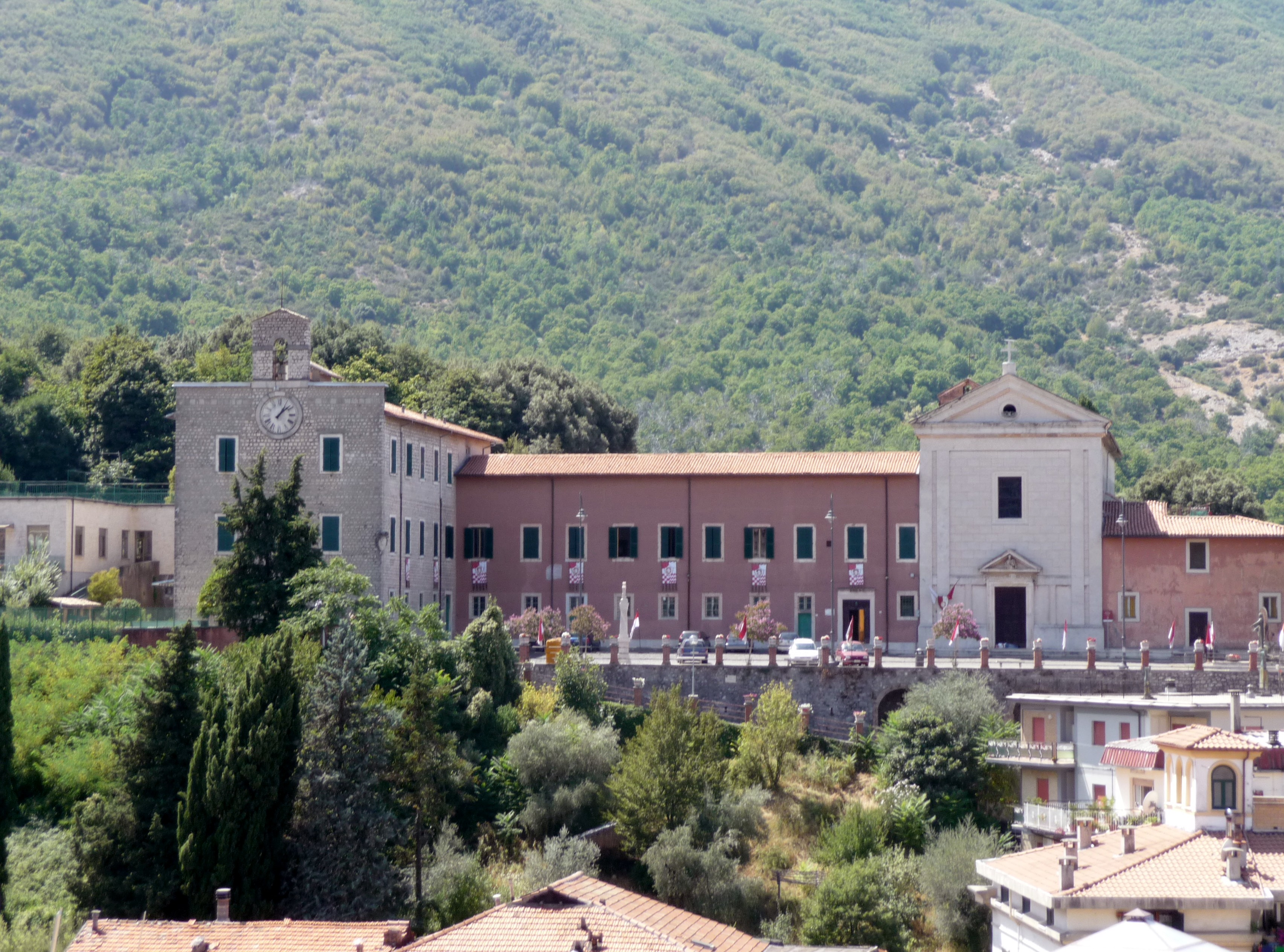 Chiesa di S.Pietro